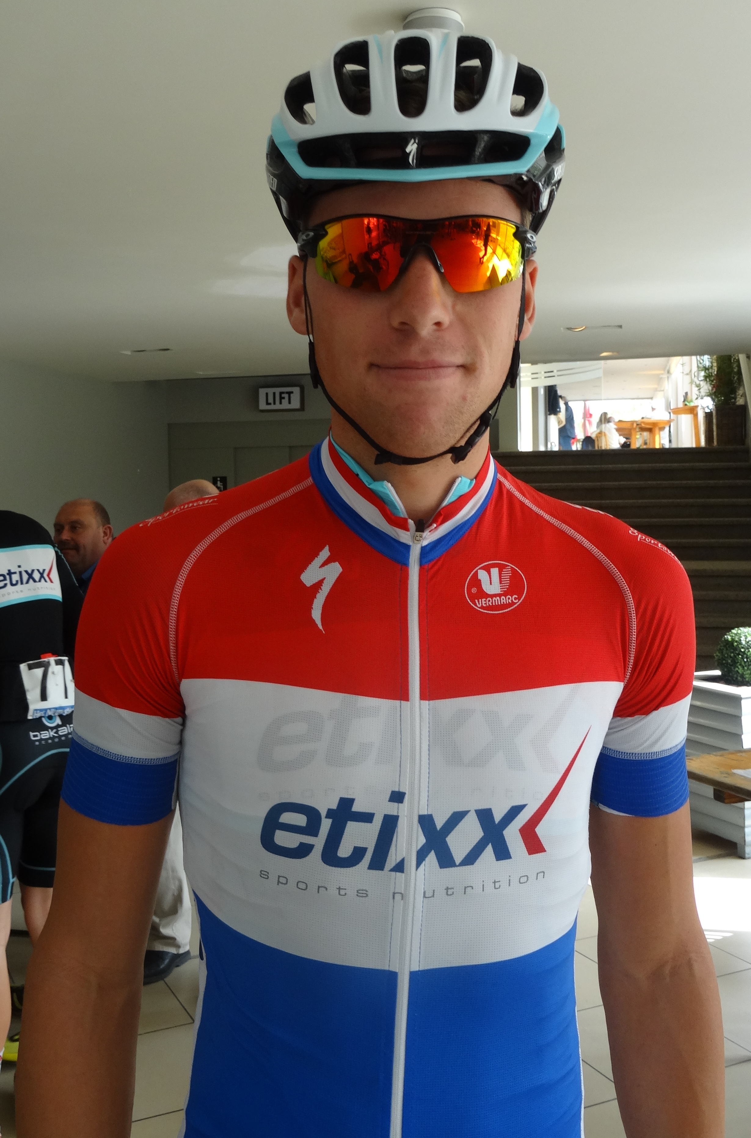 Reportage photographique réalisé le samedi 13 septembre à l'occasion du départ et de l'arrivée de la Flèche côtière 2014 à Heist (Knokke-Heist), Belgique.